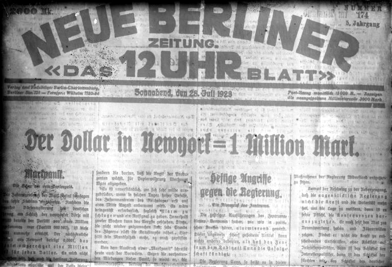 Die katastrophale Geldentwertung in Deutschland. Grosse Berliner Tageszeitungen kündigen dieses Ereignis in Blockschrift an erster Stelle an.